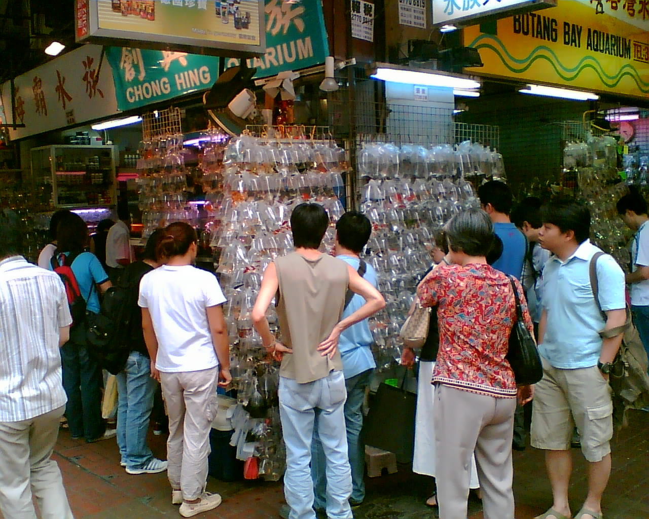 中文（香港）: 旺角金魚街。